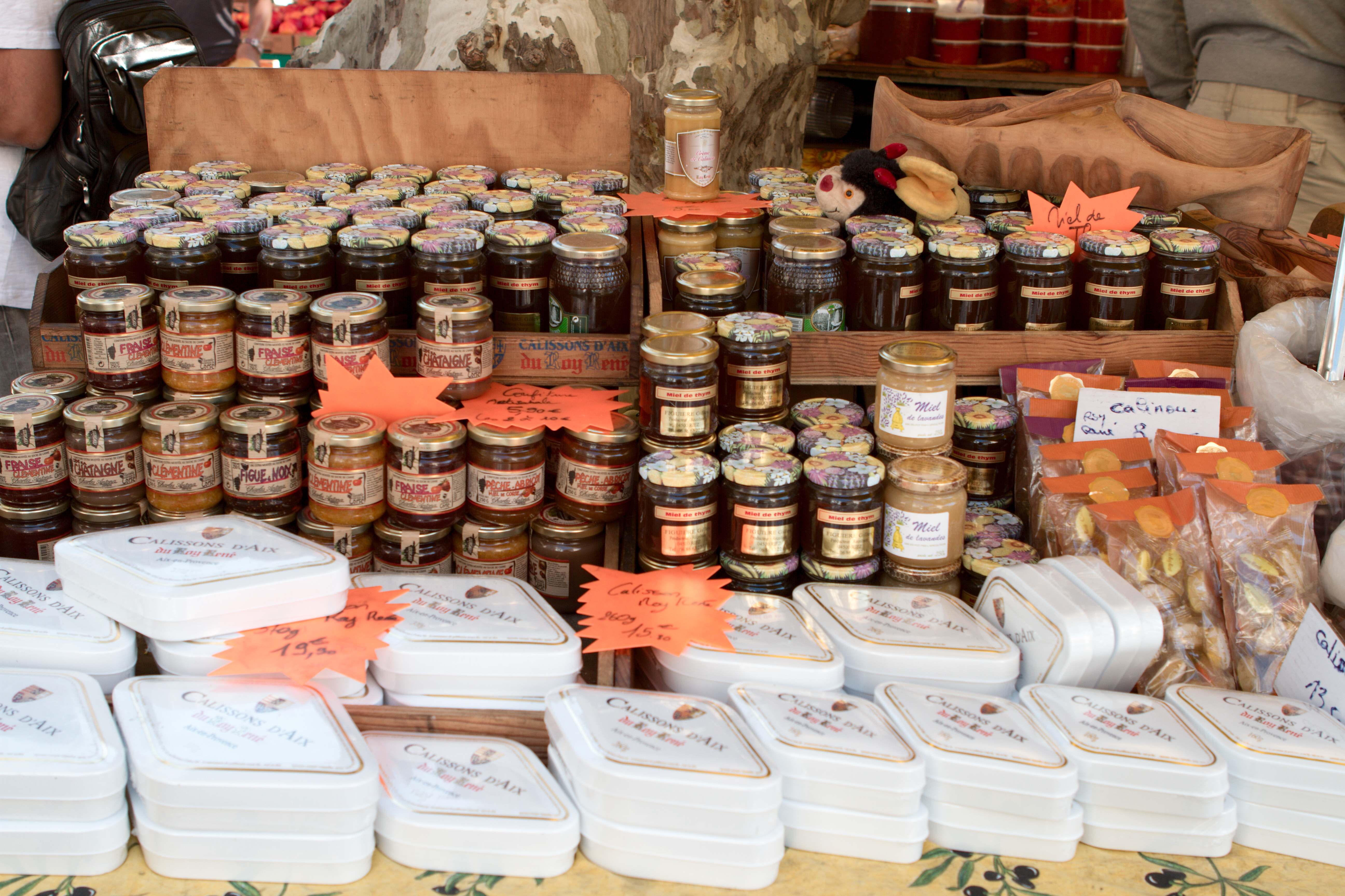 Boîtes de calissons et pots de miel sur le marché d'Aix-en-Provence (France).